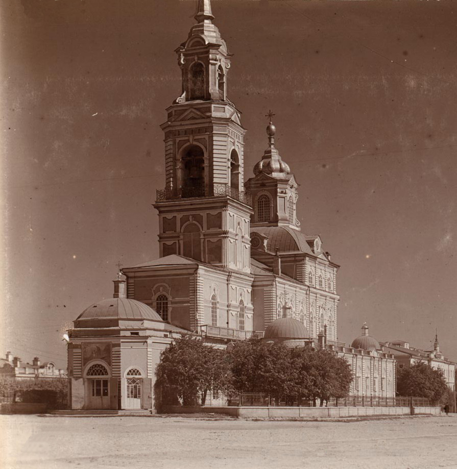 Богоявленский кафедральный собор в Екатеринбурге (был разрушен большевиками)